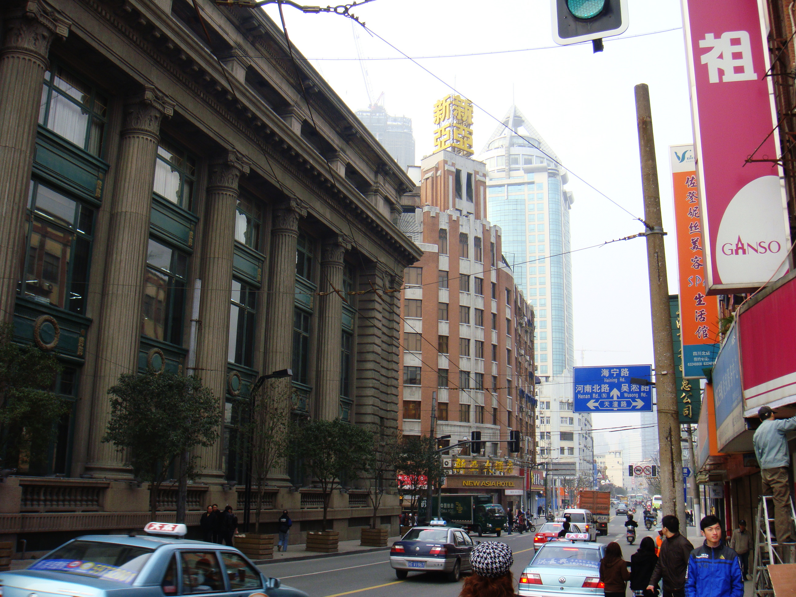 从四川路桥拍摄的邮政总局和新亚大酒店